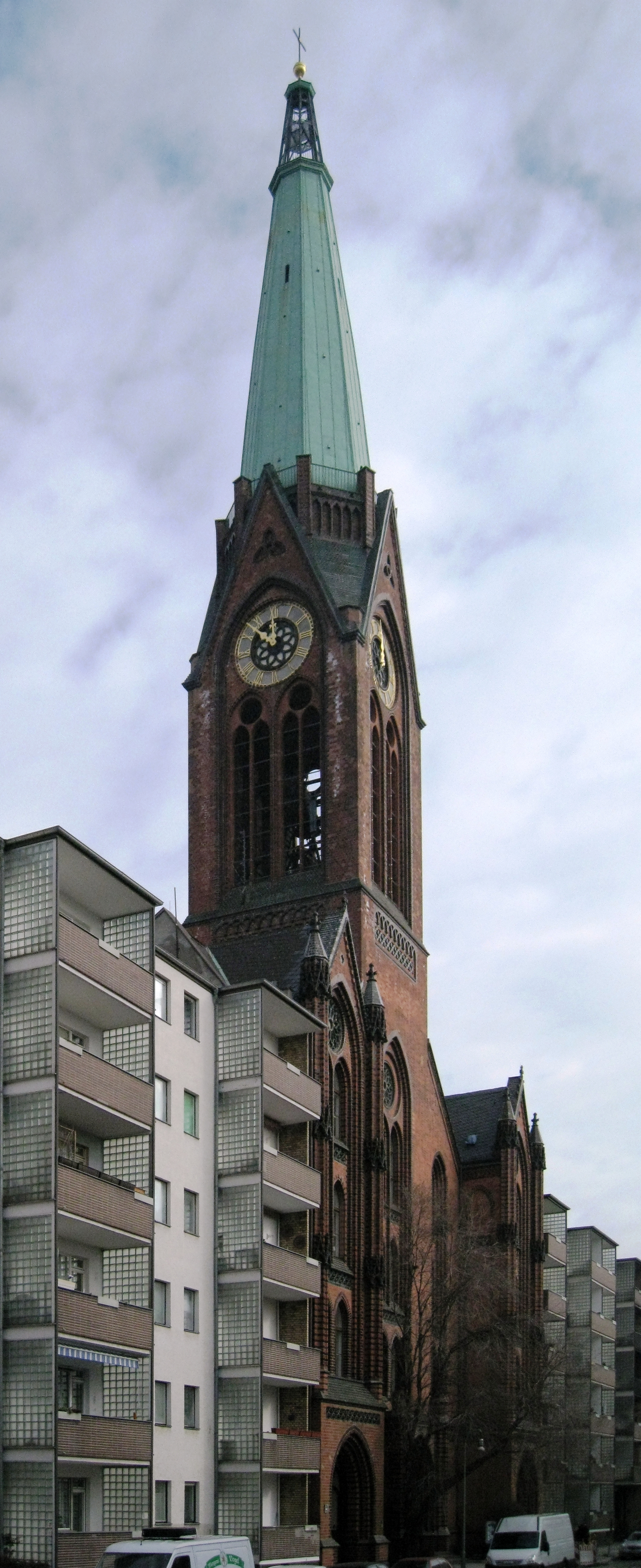 St.-Simeon-Kirche in der Front der Wassertorstraße